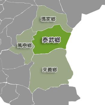 屏東縣泰武鄉相對位置